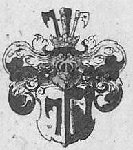 Template:Arms Moldenhauer